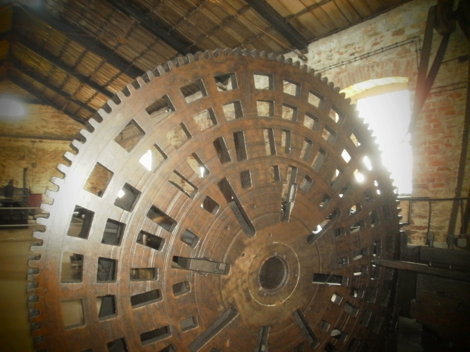 Sielpia Wielka - zespół zakładu i osiedla przemysłowego, oddział Muzeum Techniki w Warszawie (zabytek nr /A.491/1-2 z 3.12.1956 i 15.06.1967)